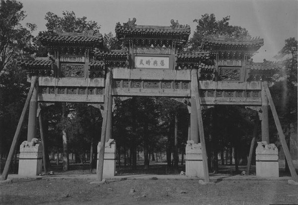 北京景山老照片。